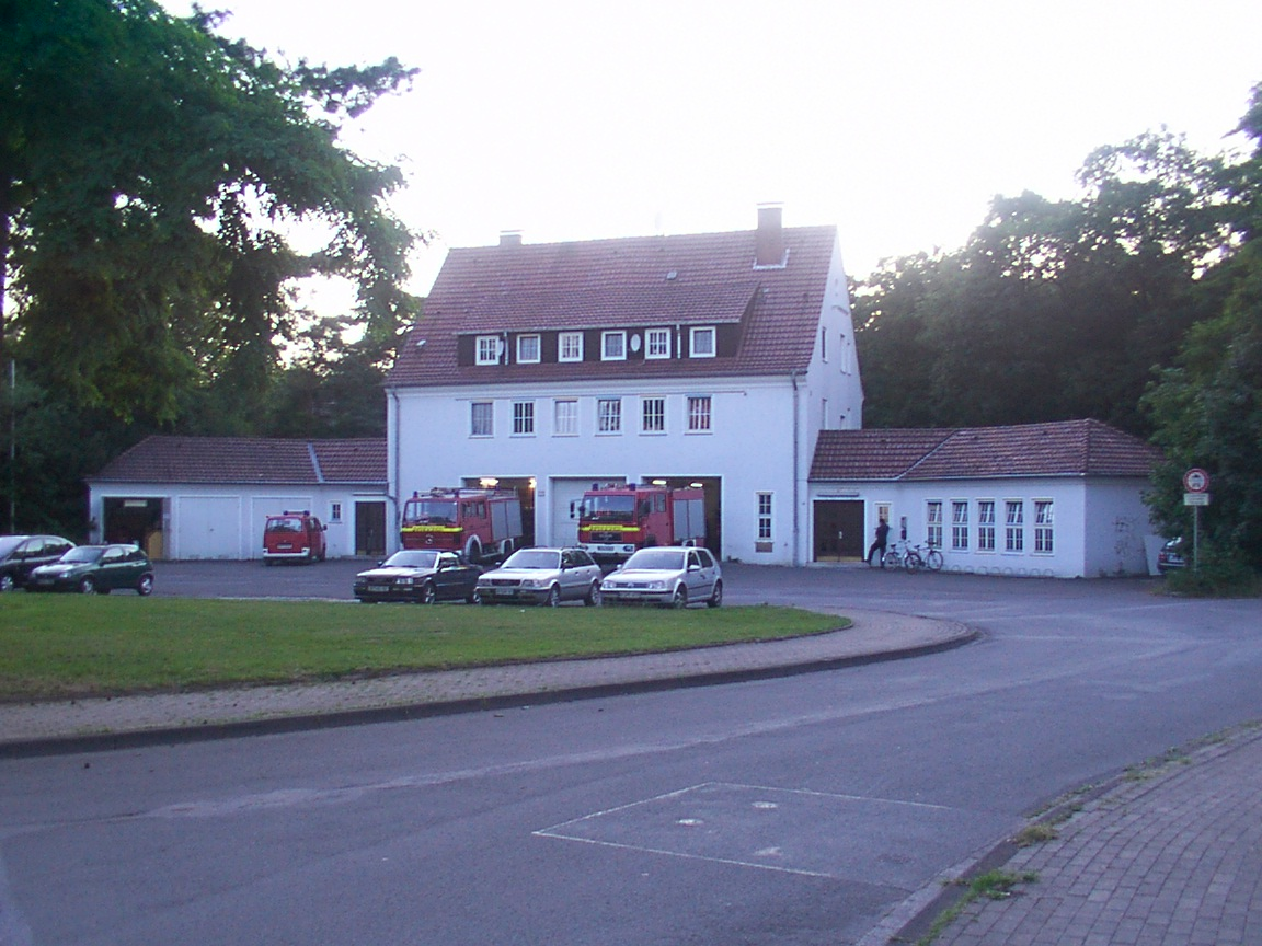 Bielefeld: Gerätehaus der Löschabteilung Senne (Die Feuerwache Süd liegt von diesem Bild aus gesehen links hinter dem Gerätehaus der LA Senne) in Windelsbleiche